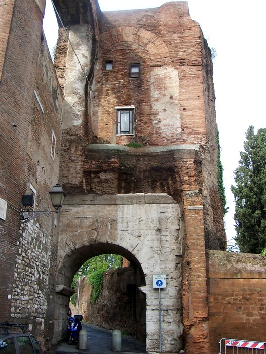 Roma - Arco di Dolabella